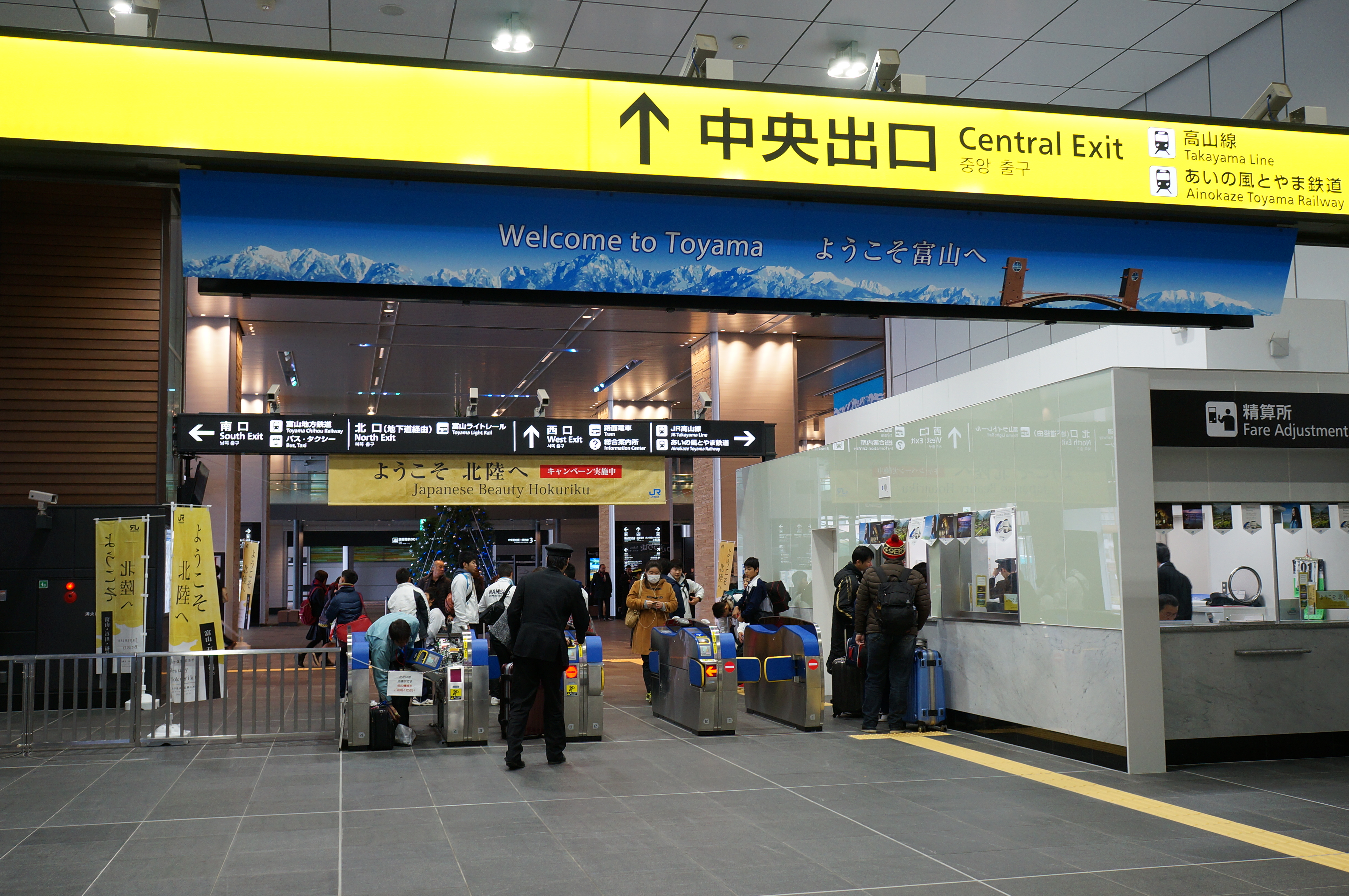 原著作者のコメント：「JR富山駅」